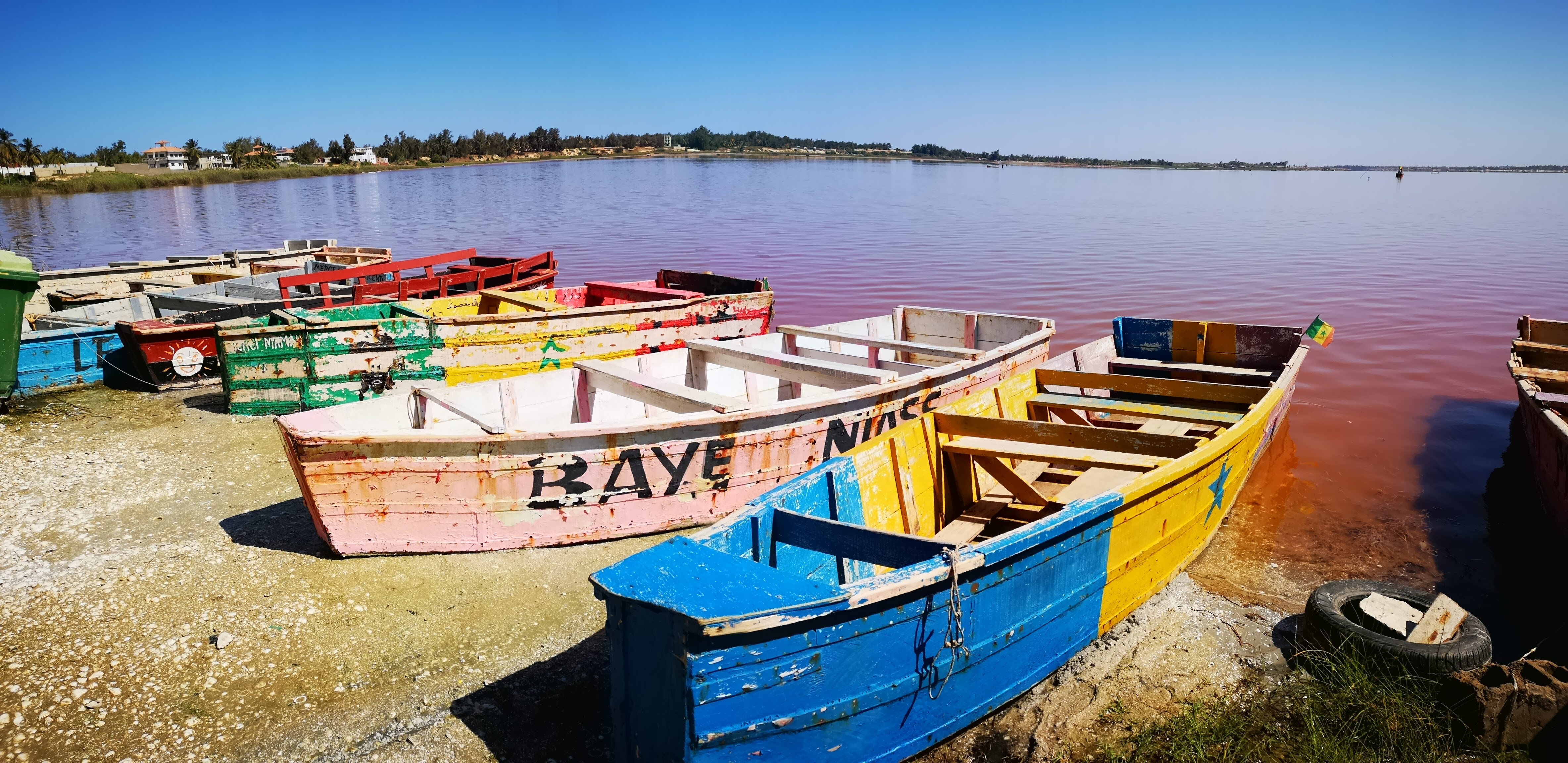 Lac rose au Sénégal